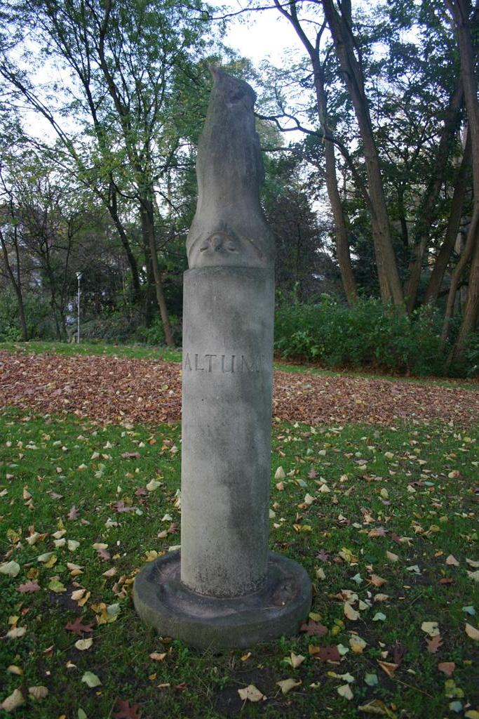 Titel: Eule Ort: Münster (Westfalen) Aufnahmedatum: 6. November 2005 Fotograf: Andreas Wieland